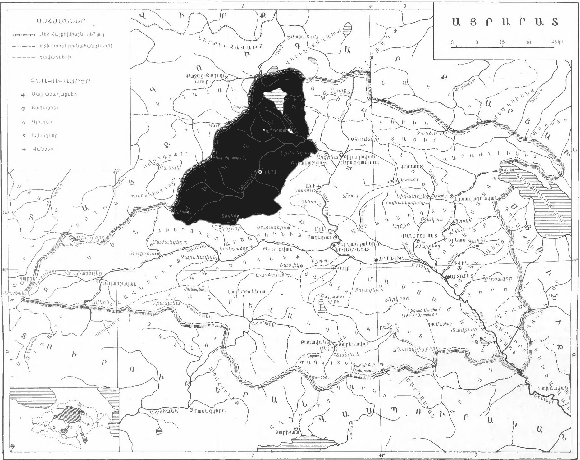 Վանանդ Այրարատ նահանգ